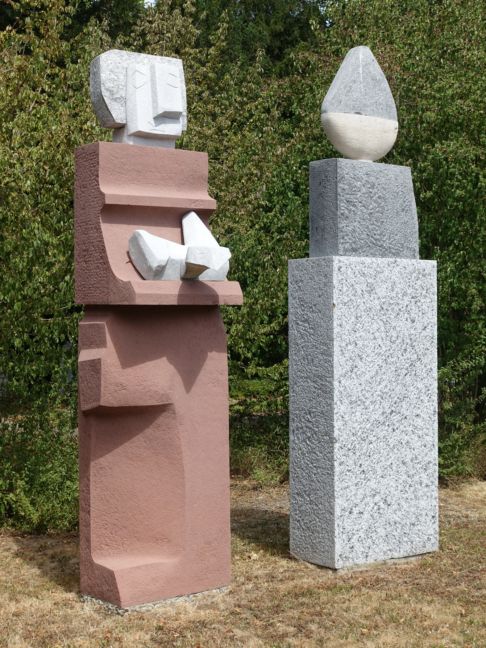 Lorenz Balmer-Gerber (1916-2004), Helene Balmer-Gerber (1924), Gemeinschaftswerk. Skulptur, Frau mit Weihgabe und Wächter, 1993. Granit, Marmor, Kalk- und Sandstein für das anonyme Gemeinschaftsgrab, Friedhof am Hörnli, Basel.